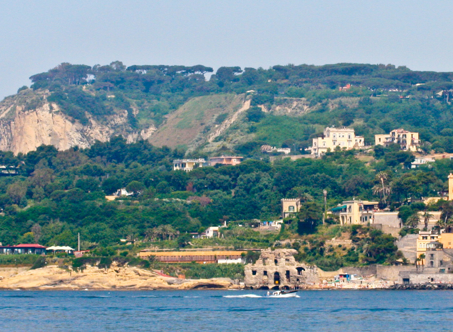 Napoli, la costa di Posillipo. In primo piano il Palazzo degli Spiriti.